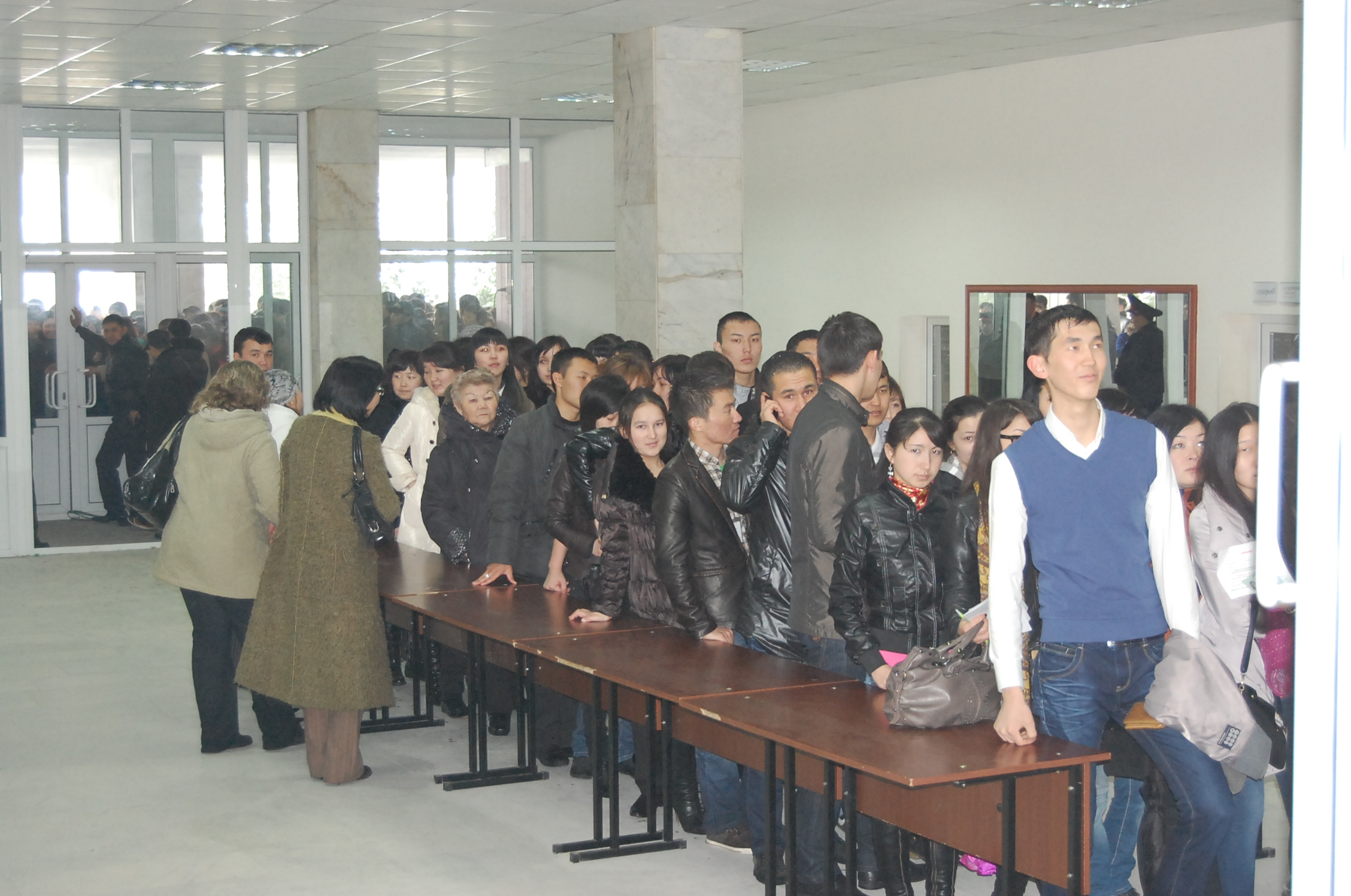 Очередь на избирательном участке №186 в Алматы, расположенном на территории Казахского национального университета имени аль-Фараби.